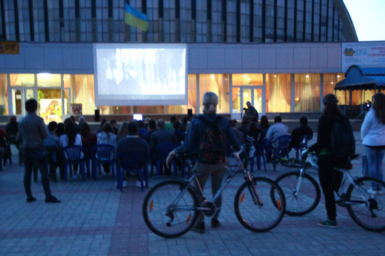 Финальный показ Международного виде-марафона "За 80 у.е. вокруг Евро"